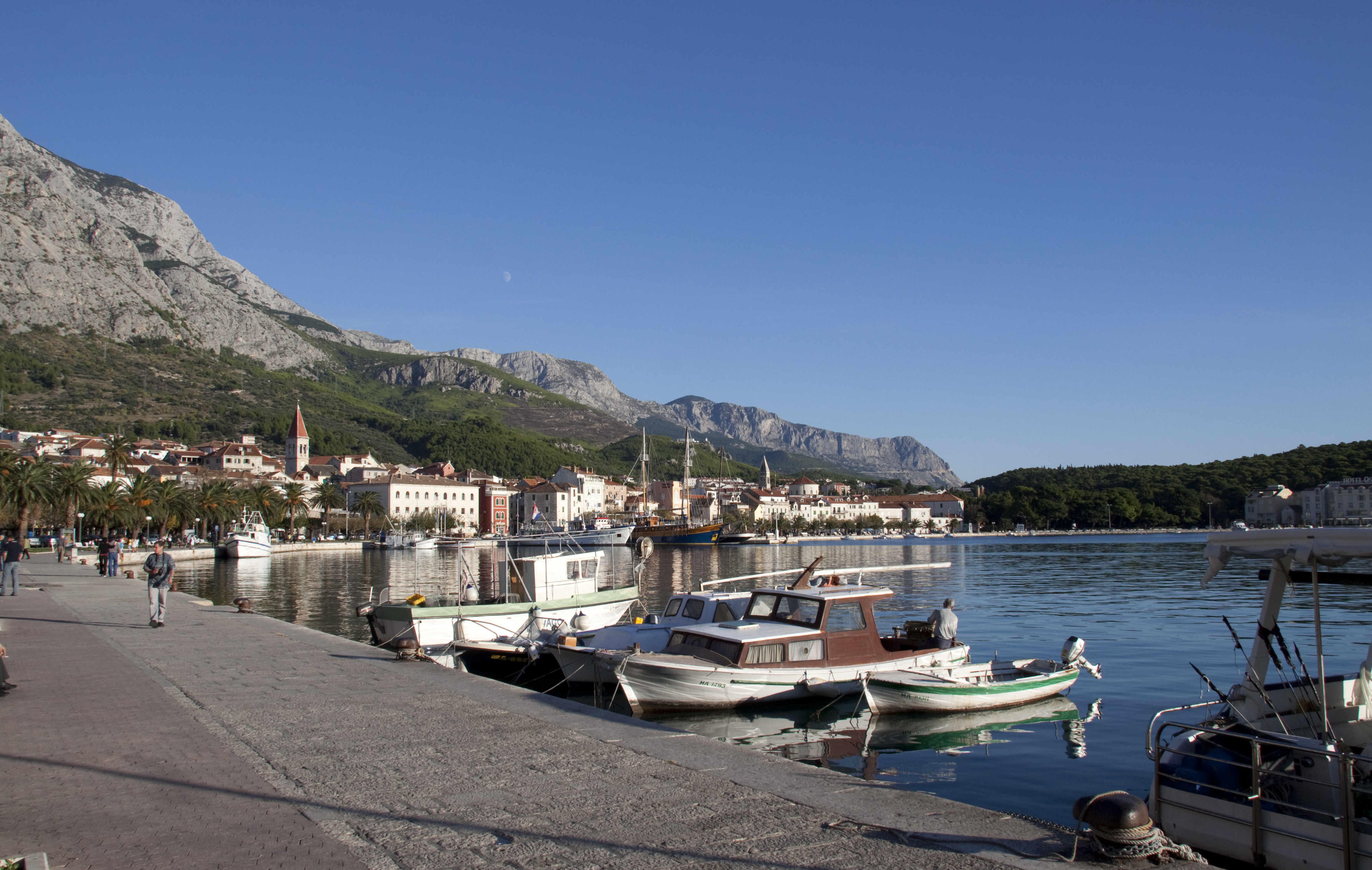 Makarska Harbour 3